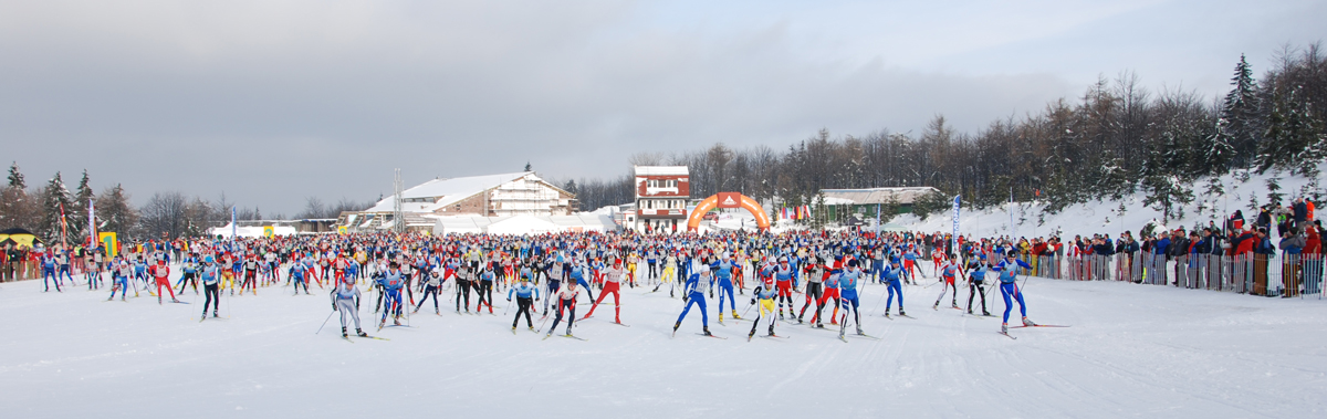 Štart 34. Bielej Stopy